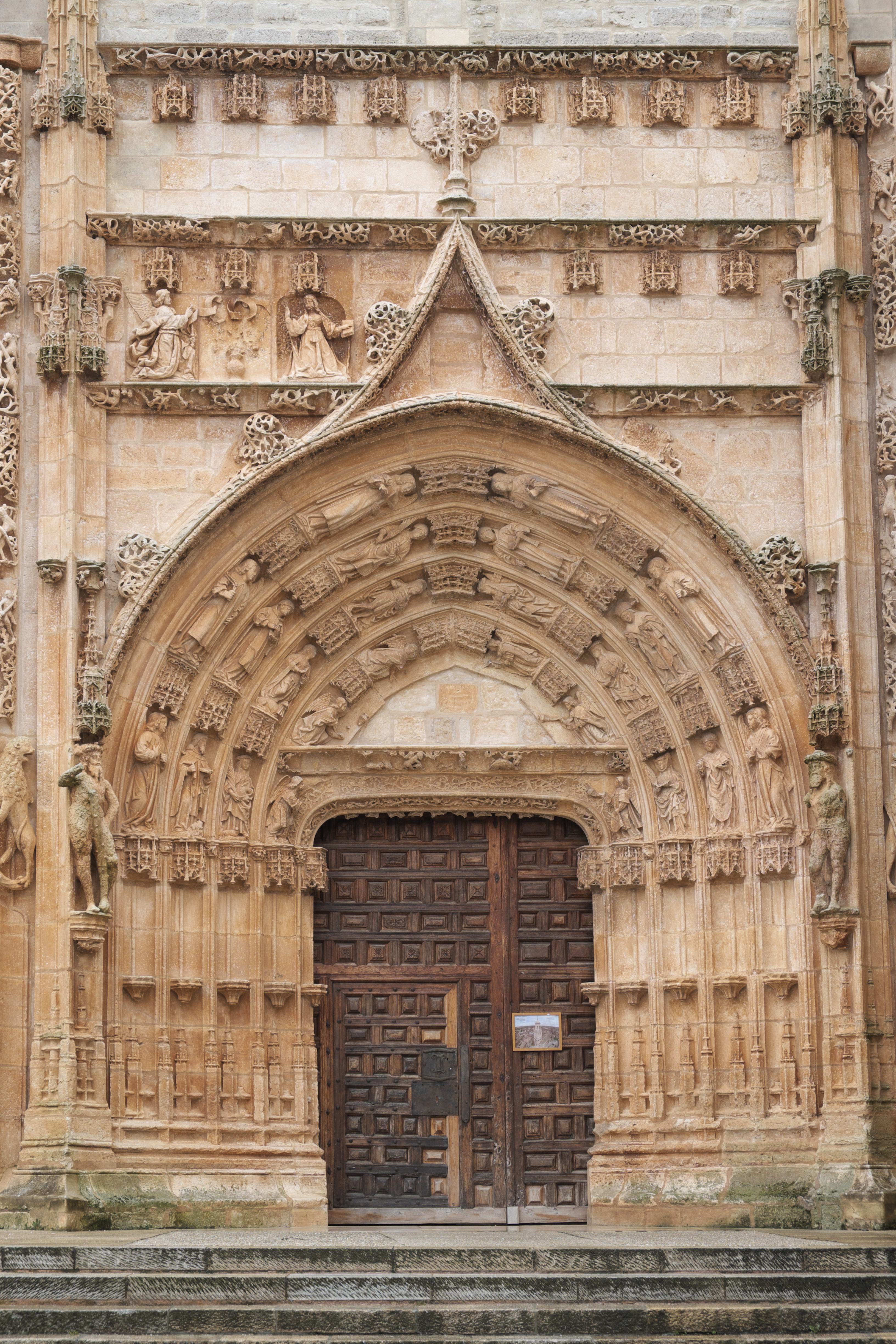 Kirche Asunción de Nuestra Señora (Mariä Himmelfahrt) in Santa María del Campo in der Provinz Burgos (Kastilien-León/Spanien), Nordportal